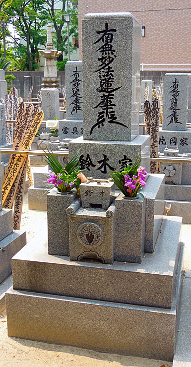 鈴木三重吉の遺骨が納められている、鈴木家の墓（広島県・長遠寺）